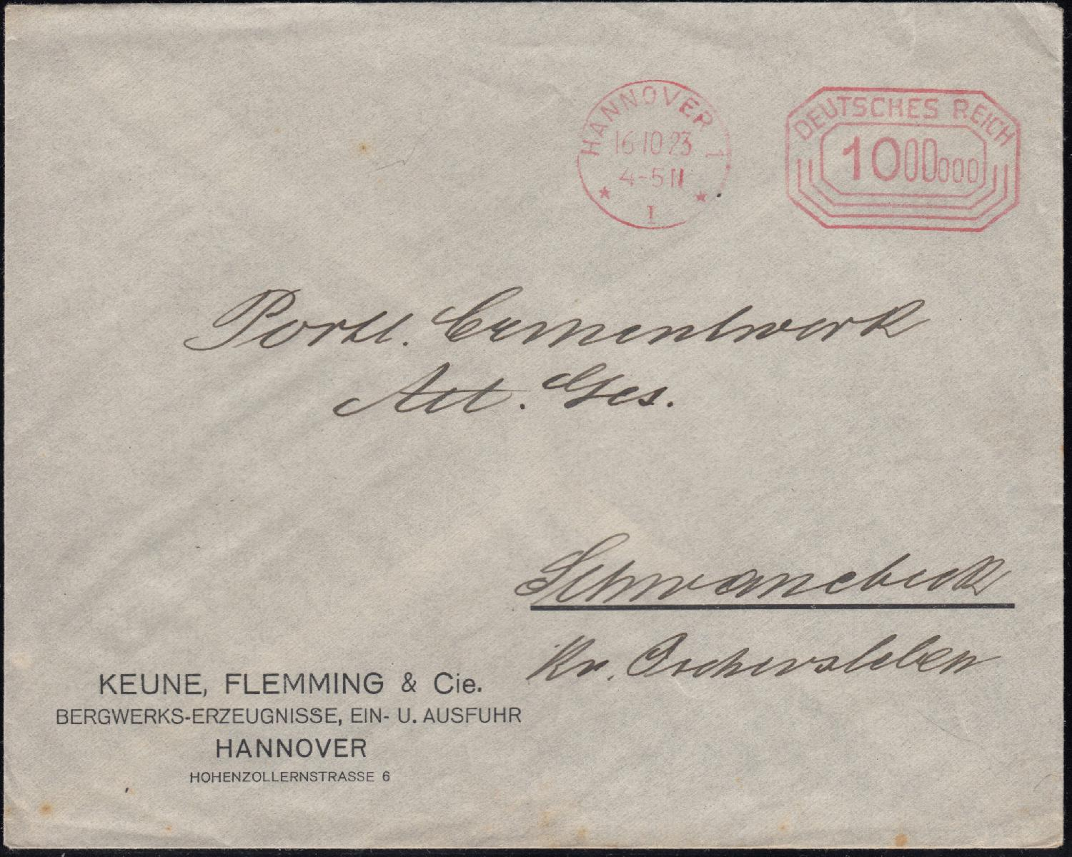 Mit 1 Million Reichsmark frankierter, sogenannter Infla-Brief aus der Inflationszeit der Weimarer Republik, mit Poststempel Deutsches Reich datiert 16. Oktober 1923, versandt von der Firma Keune, Flemming & Cie., Bergwerks-Erzeugnisse, Ein- und Ausfuhr, mit Sitz in der Hohenzollernstraße 6 in Hannover, versandt an die Portlandwerk Actien Gesellschaft in Schwanebeck, Kreis Oschersleben ...